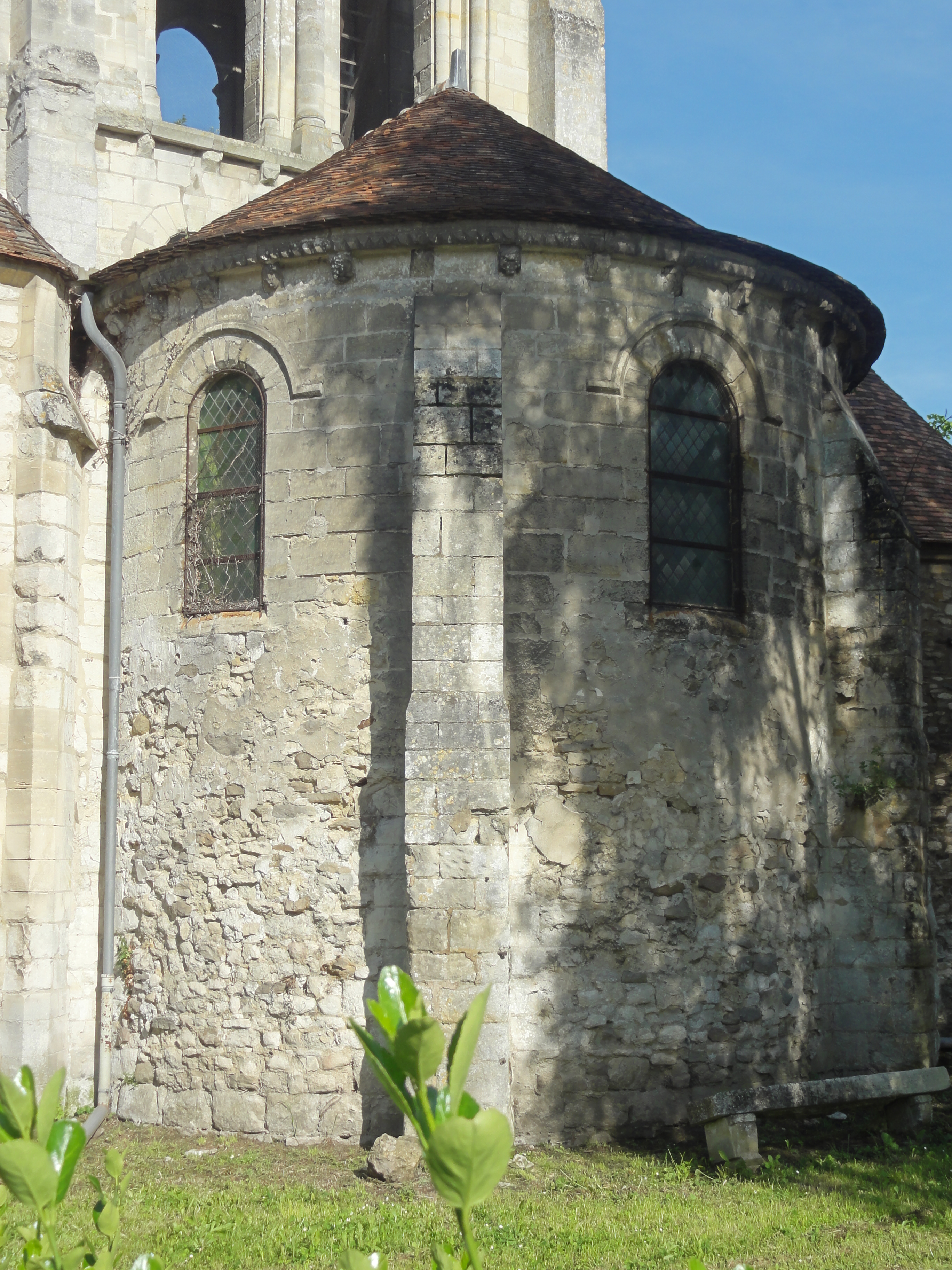 Chœur.